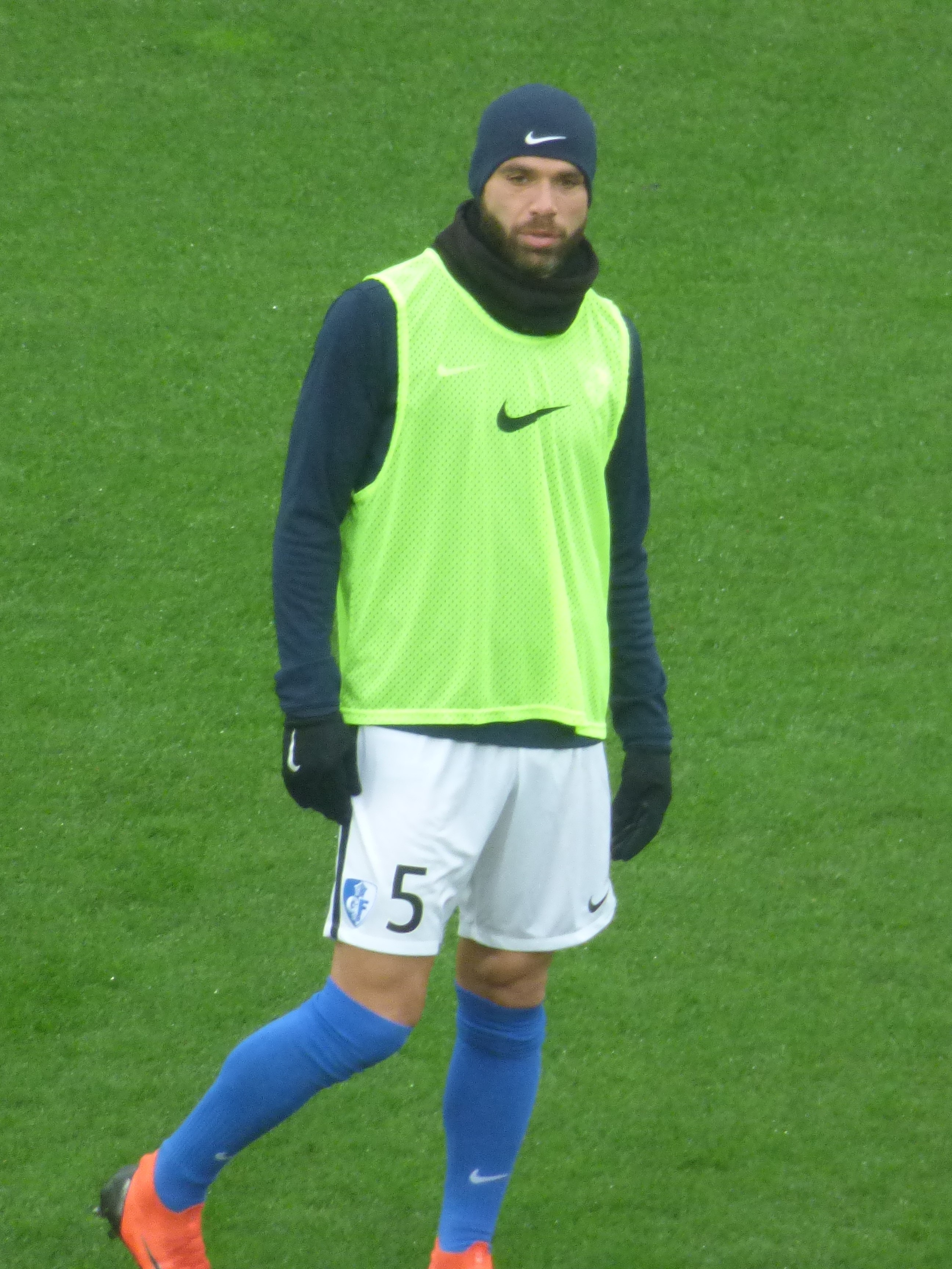 Selim Bengriba avant le match RC Lens / Grenoble Foot 38, le 24 novembre 2018, comptant pour la quinzième journée du championnat de France de football de Ligue 2 2018-2019, au Stade Bollaert-Delelis.